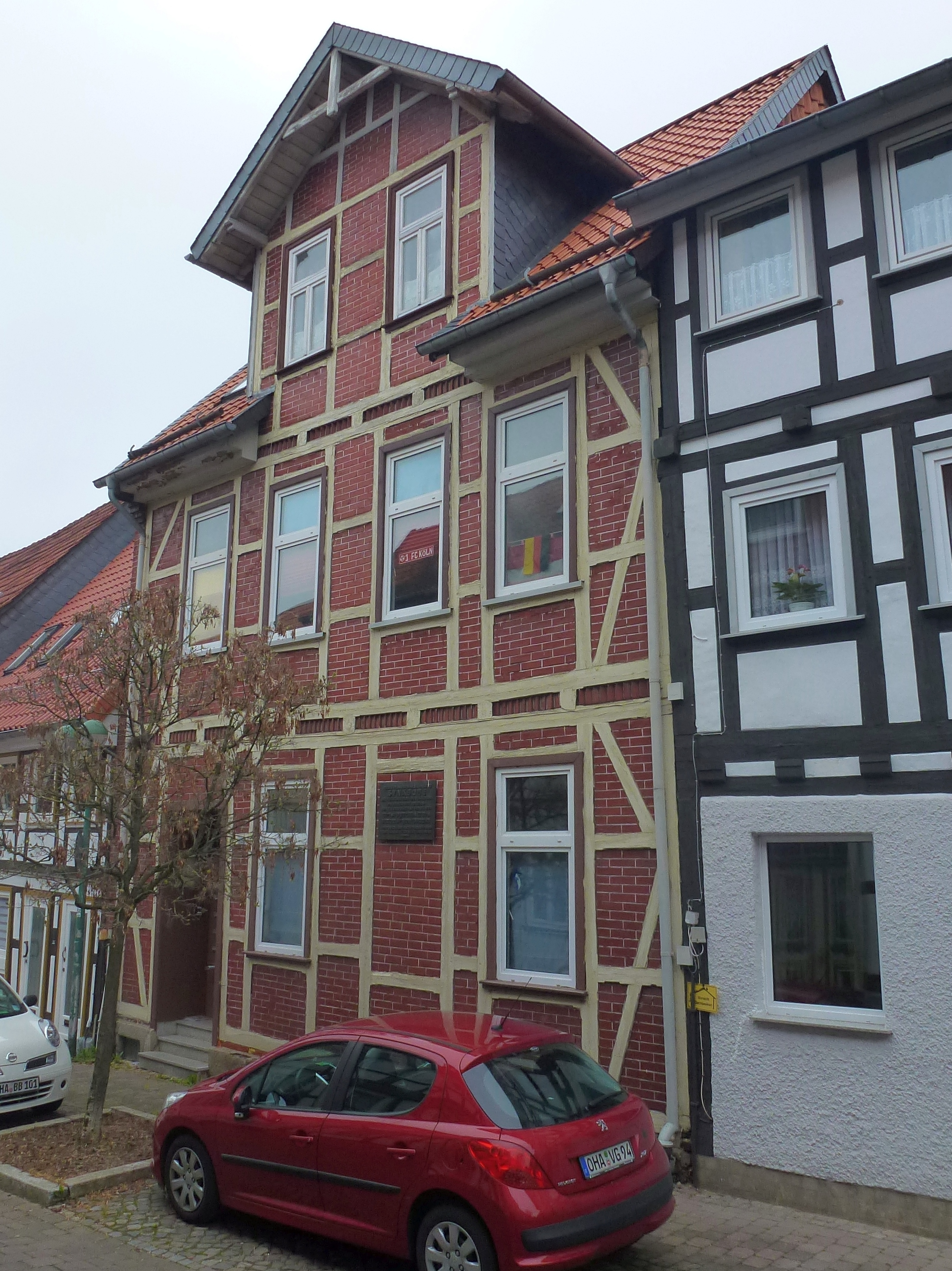 Vorderhaus der ehemaligen Synagoge